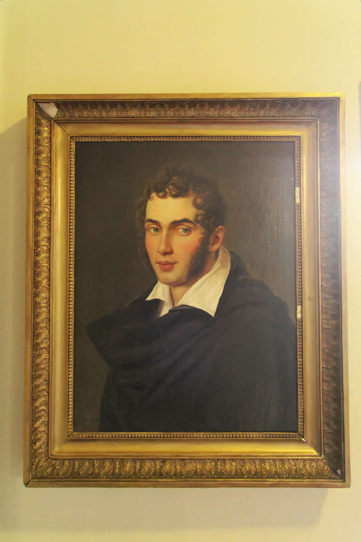 Aachen, Couven-Museum, Selbstbildnis des Malers Johann Baptist Joseph Bastiné